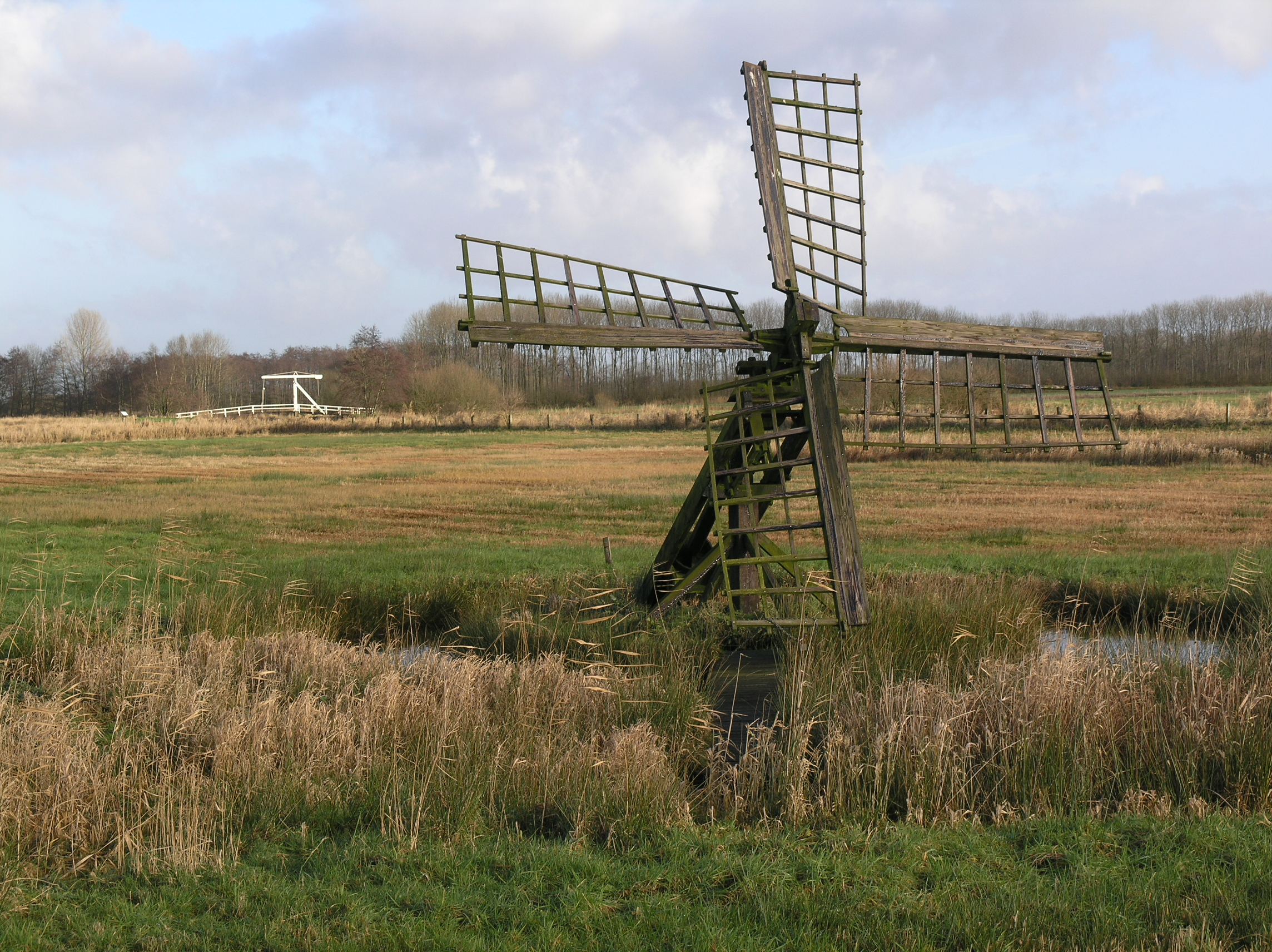 De Hoeve tjasker